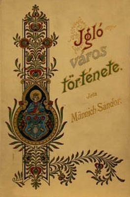 Münnich Sándor (1843–1918): Igló királyi korona- és bányaváros története. Sajtó alá rend. Nikházy Frigyes. Kiad. Igló városának tanácsa. Igló, 1896. Schmidt. 1 t. (panorámakép, kihajtható) 2 sztl. lev. 558 l. 1 sztl. lev. LVIII, 2 sztl lev. 8 t. (képanyag) 1 mell. (hasonmás, kihajtható). Kiadói, díszesen festett, aranyozott egészvászon-kötésben.